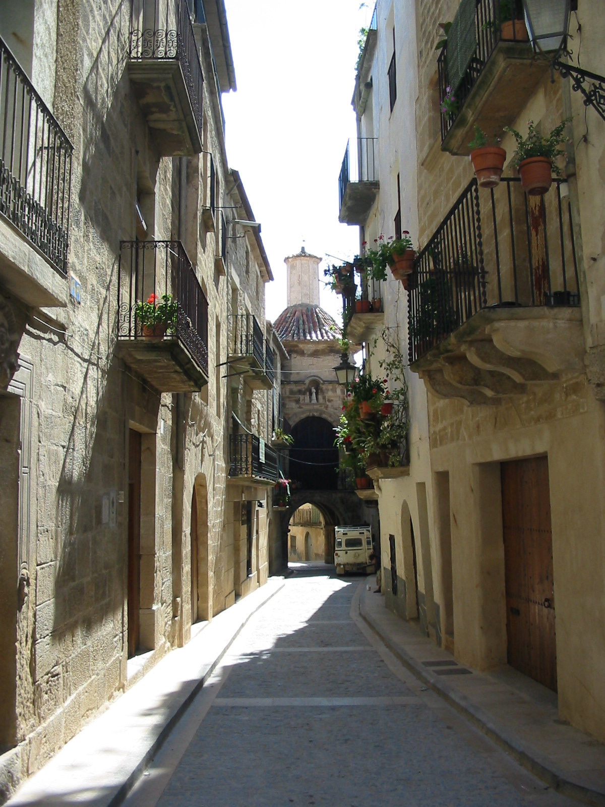 Carrer de Calaceit